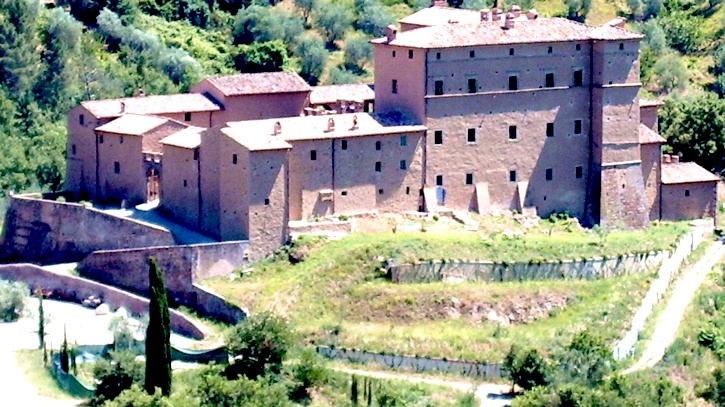 Il Castello di Potentino presso Seggiano (GR), Tuscany (Italy)